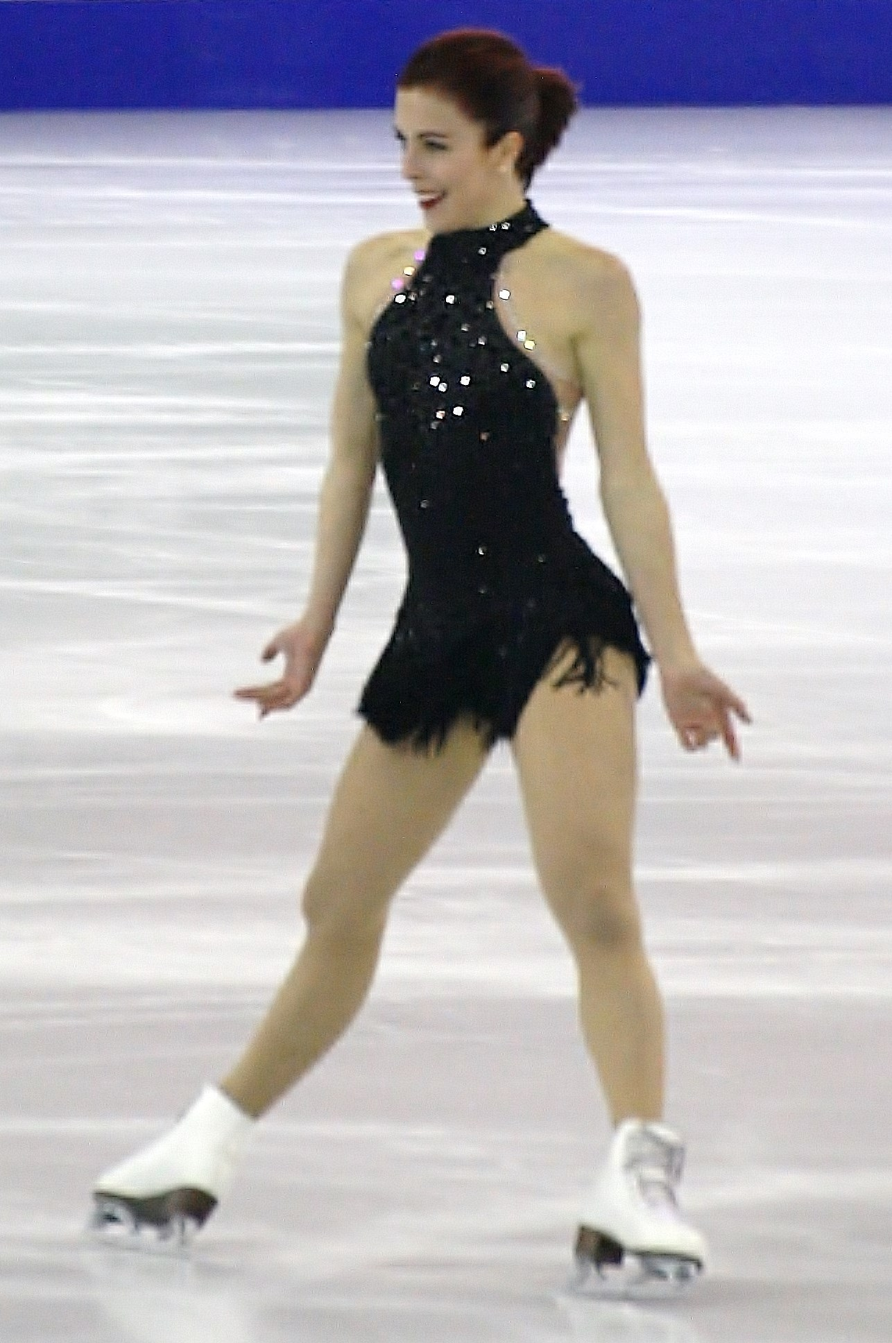 Эшли Вагнер (США) на финале Гран-при по фигурному катанию 2015-2016